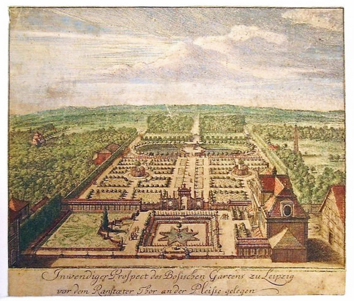 Der Kleinbosische Garten in Leipzig auf einem kolorierten Kupferstich von 1705